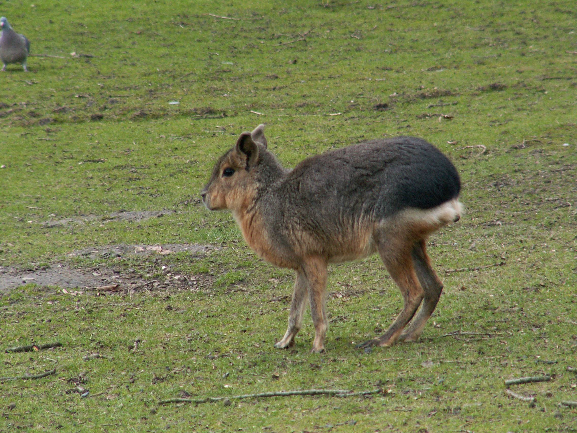 Dolichotis patagonum, großer Pampashase, selbst aufgenommen in Hagenbecks Tierpark, Hamburg, Deutschland.